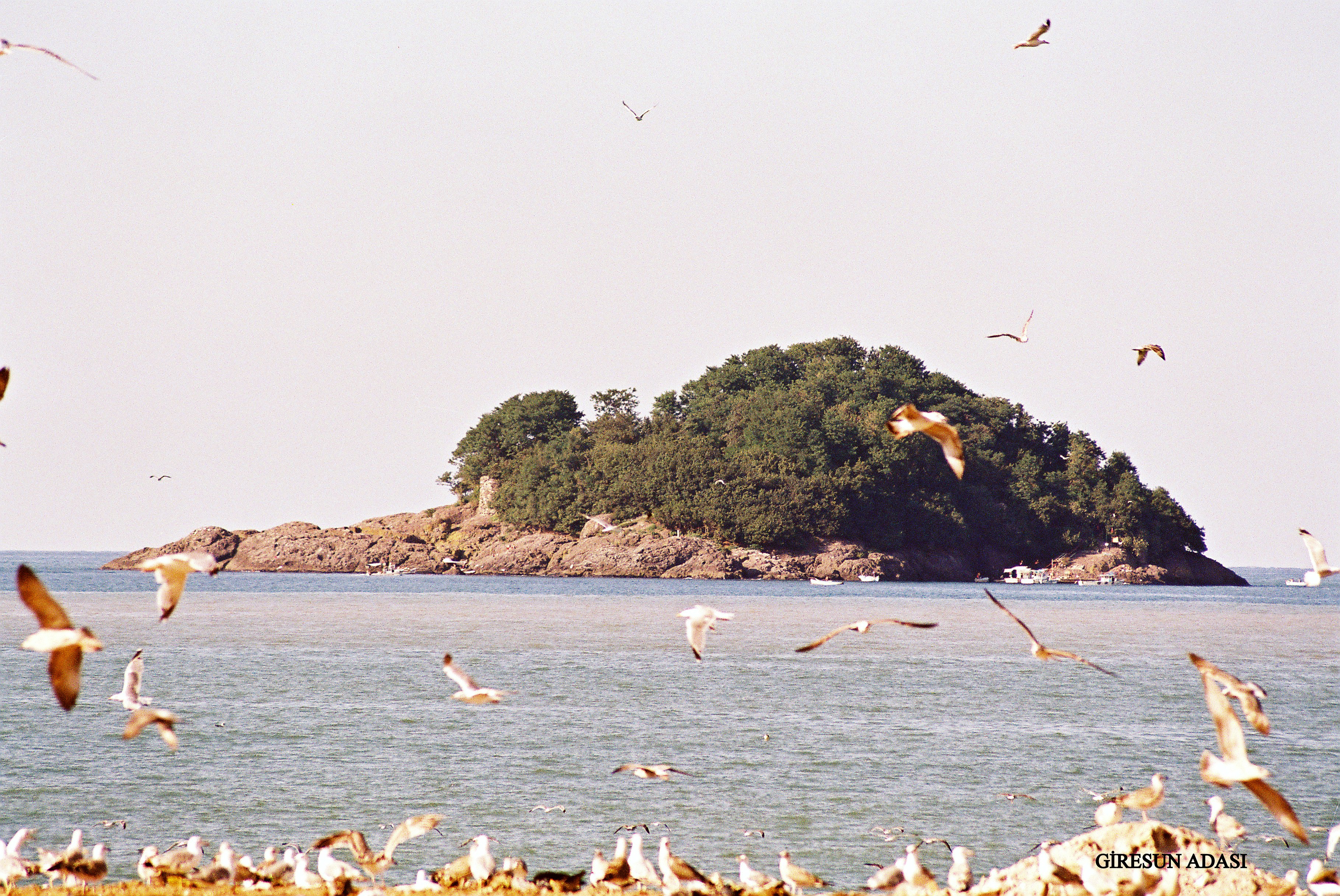 Do¤u Pontus bölgesinin önemli yerleflimlerinden biri olan antik Kerasous (Giresun) kentinin 1.7 km. aç›¤›nda bulunan Aretias adas›, Do¤u Karadeniz'de antik dönemde ve ortaça¤da yerleflime sahne olmufl tek adad›r. Ada yaklafl›k 40.000 mÇ yüzölçümüne sahiptir. Denizden en yüksek noktas› 24.5 m. olan ada üzerinde klasik döneme ve ortaça¤a ait kal›nt›lar bulunmaktad›r. Antik kaynaklar adaya, Grek döneminde ‘Ares’, Roma ‹mparatorluk döneminde ‘Khalkeritis’ adas› denildi¤ini; Pharnakeia’n›n hemen karfl›s›nda yer ald›¤›n›; Ares’e adanm›fl bir tap›nak oldu¤unu ve Amazonlar›n burada siyah bir tafla (flimdiki Hamzatafl›) tap›nd›¤›n› bildirmektedir. Ada surlar›n›n, Trabzon Pontus ‹mparatoru Alexius II Komnenos (1297- 1330) Dönemi’nde infla edildi¤i bilinmektedir. Türklerin adaya ilk kez 1368 y›l›nda ç›kt›¤› bilinmektedir. Osmanl› hâkimiyeti boyunca Giresun Adas›, her türlü Osmanl›-Rus mücadelesi s›ras›nda stratejik konumu ile önem kazanm›flt›r. 1806- 1812 Osmanl›-Rus Savafl› s›ras›nda Giresun kent surlar› ve adan›n surlar› güçlendirilmifltir. 2009 y›l›nda bafllat›lan sistematik ve periyodik araflt›rmalar ve 2011 y›l›nda bafllat›lan kaz› çal›flmalar› sonucunda adada yer alan yap›lardan baz›lar› k›smen ortaya ç›kar›lm›flt›r. Surlarla çevrili olan adada ortaça¤ yerleflimine ait tap›nak üzerine infla edilmifl kilise, kule/yönetici yap›s›, flapel ve sarn›ç gibi yap›larla birlikte Klasik ve Helenistik döneme ait liman sahas›, basamakl› altar ve sunu çukurlar› tespit edilmifltir. Ada, kayal›k k›y› fleridinin hemen ard›ndan oldukça güçlü bir sur ile tümüyle çevrelenmifltir. Surlar yaklafl›k 600 m. uzunlu¤ unda, ortalama 6 m. yüksekli¤inde ve yaklafl›k 0.9 m. enindedir. Sur yap›s›n›n toplamda 150 metrelik bölümü yer yer y›k›lm›fl ve yaklafl›k 450 metrelik bölümü k›smen korunarak günümüze ulaflabilmifltir.